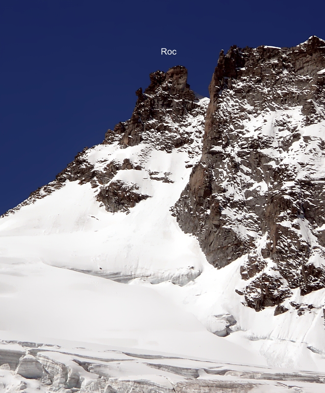 Il Roc visto dal Ghiacciaio della Tribolazione